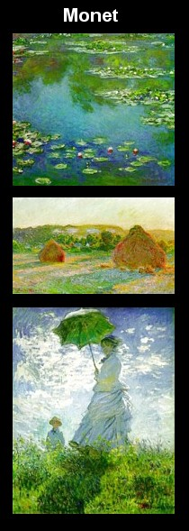 Impressionism